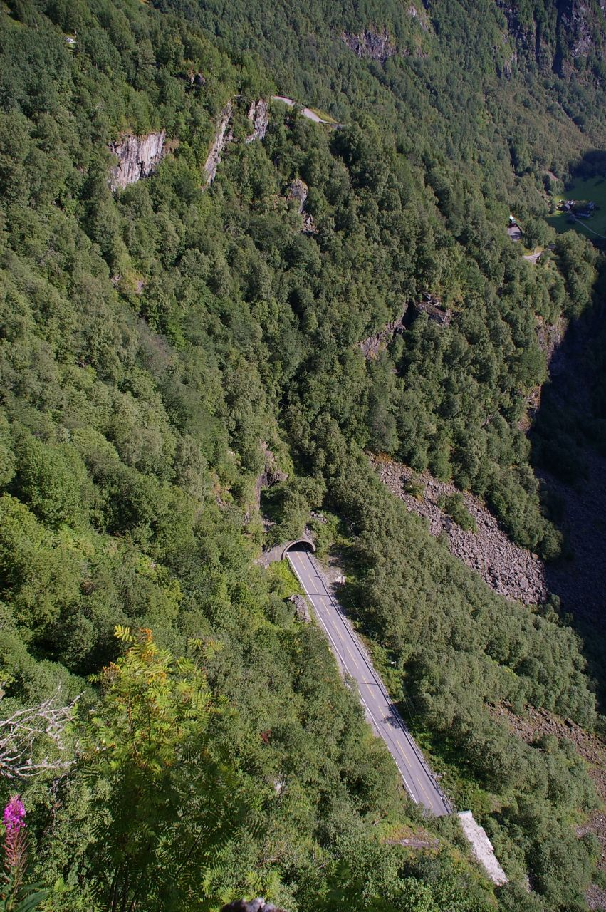 Den stutte opne vegbiten mellom Stalheimstunnelen og Sivletunnelen på Europaveg 16, sett frå Stalheim hotel. Lenger bak kan ein sjå nokre bitar av gamlevegen som svingar seg opp Stalheimskleivi, og tunet på garden Sivleøyni til høgre.